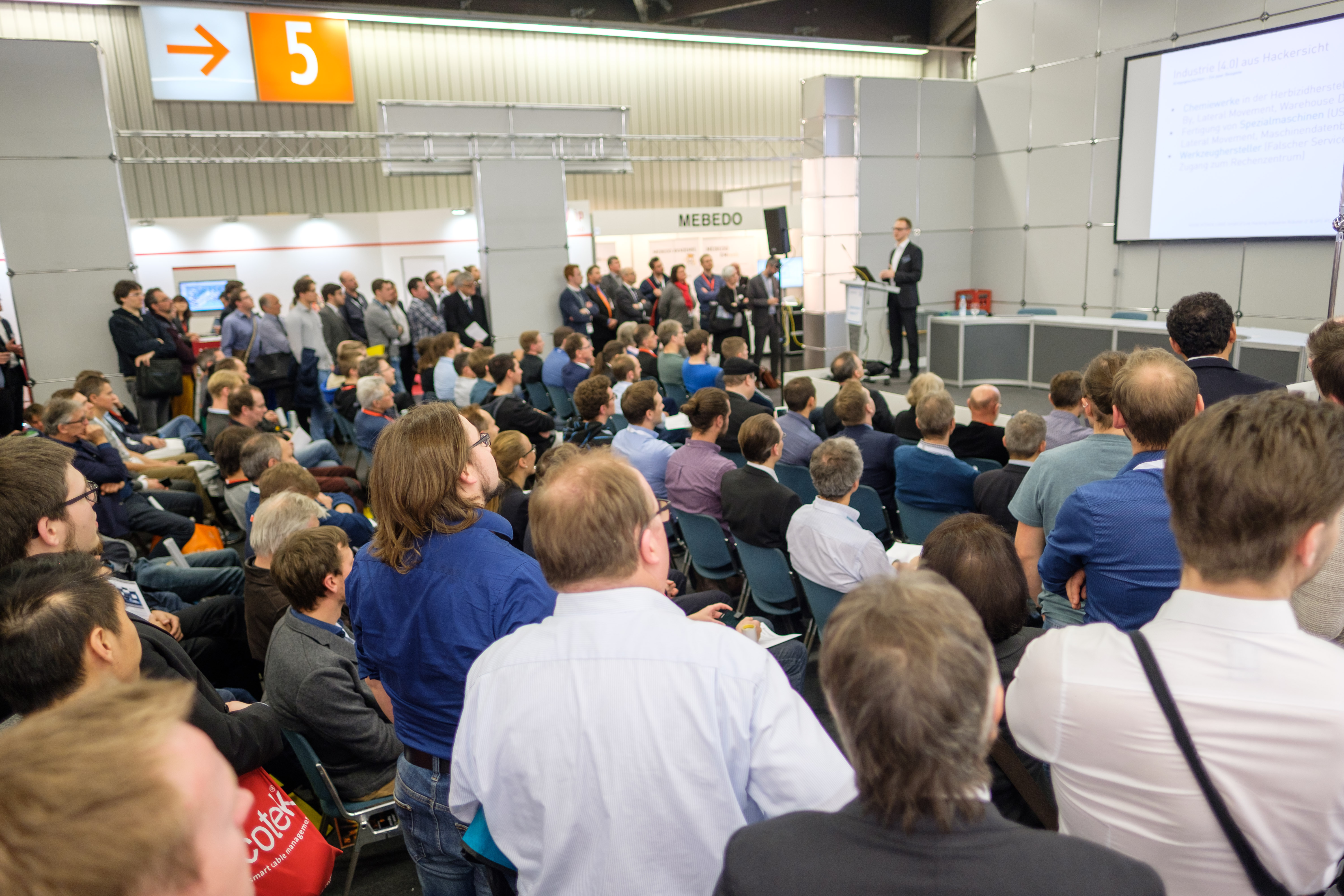 Produktpräsentation auf dem Forum Automation meets IT